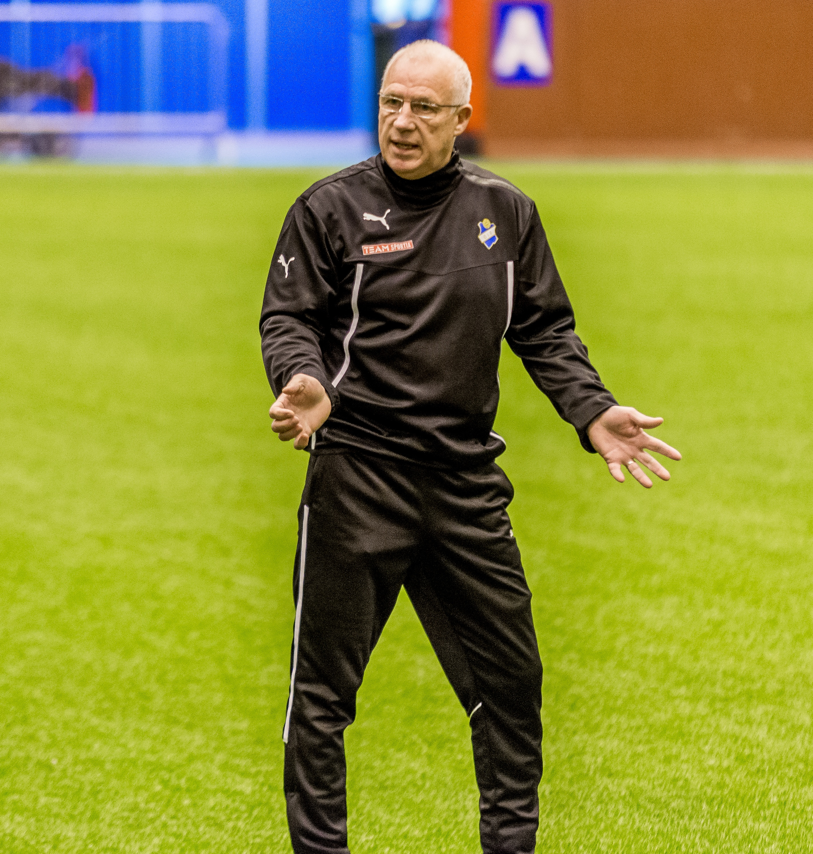 Jan "Lill-Damma" Mattsson leder sitt första träningspass som assisterande trönare efter återkomsten till Östers IF, 8/1 2013.